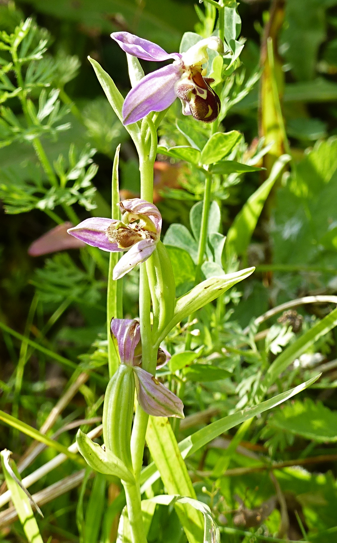 Orchidée Ophrys abeille, rencontrée dans le val de Claise